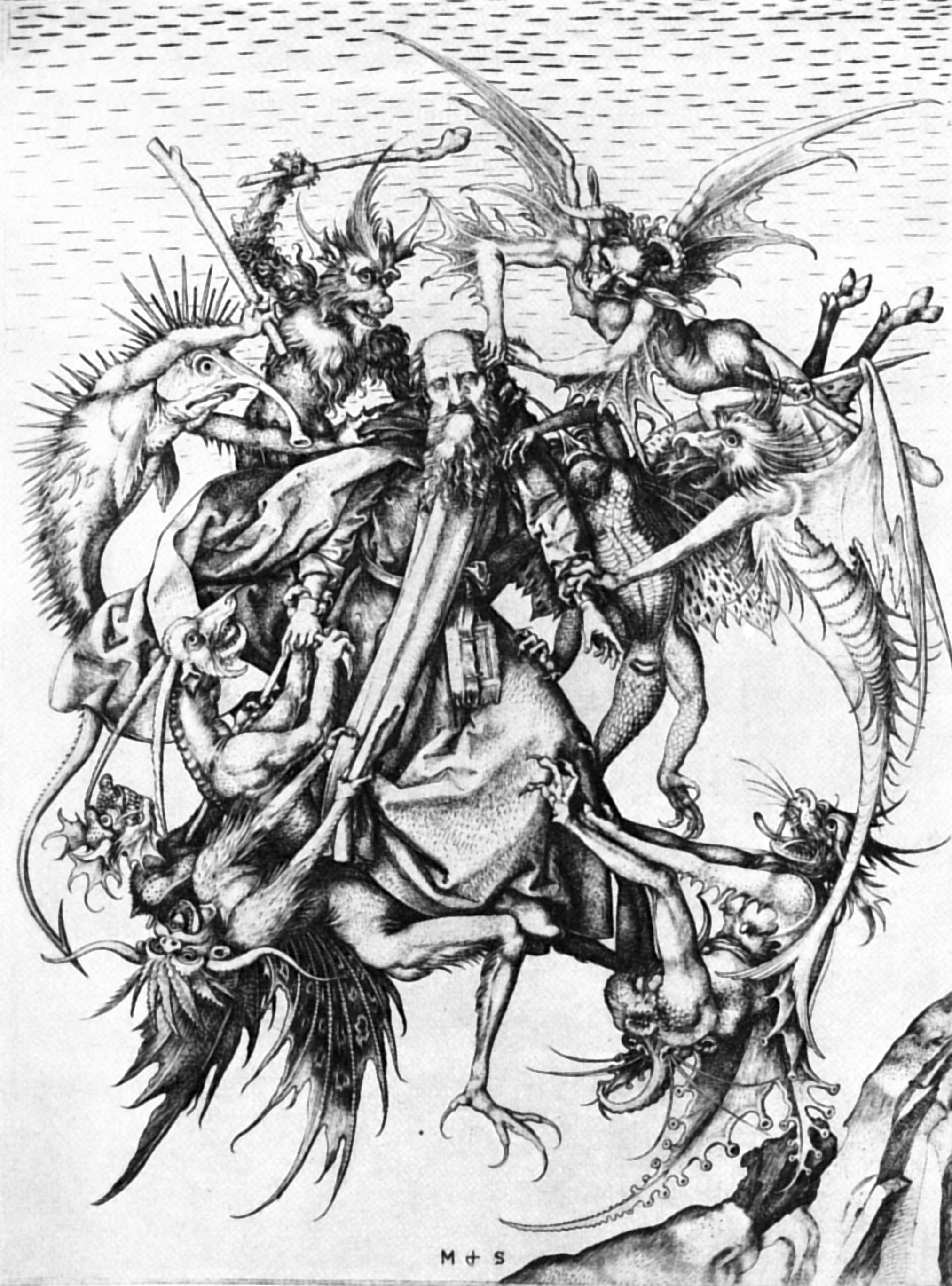 Kupferstich "St. Antonius von Dämonen gepeinigt" von Martin Schongauer (1430-1491)